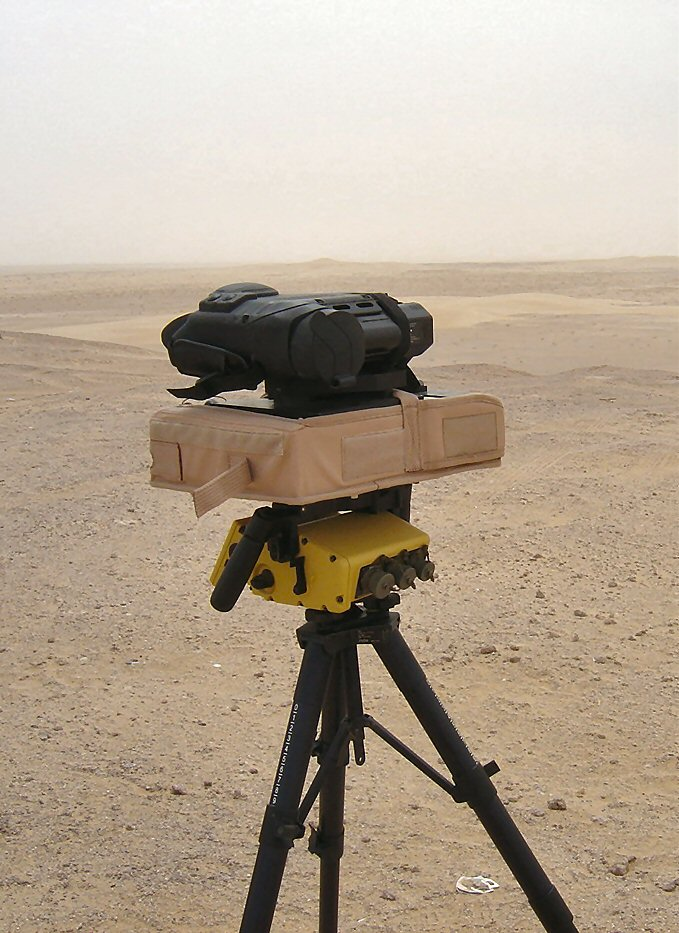 Télémètre laser DHY 307 couleur sable en station - Télémétrie laser - CILAS